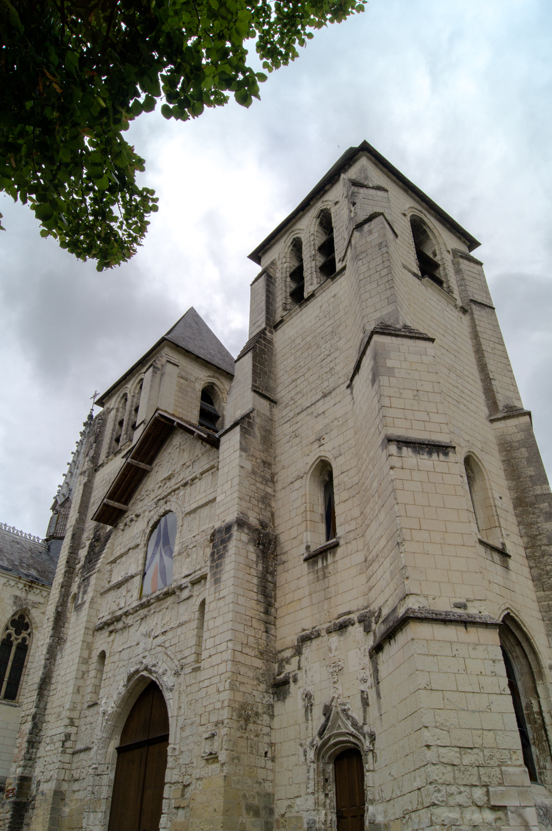 Abbaye Saint-Mexme (Classé)